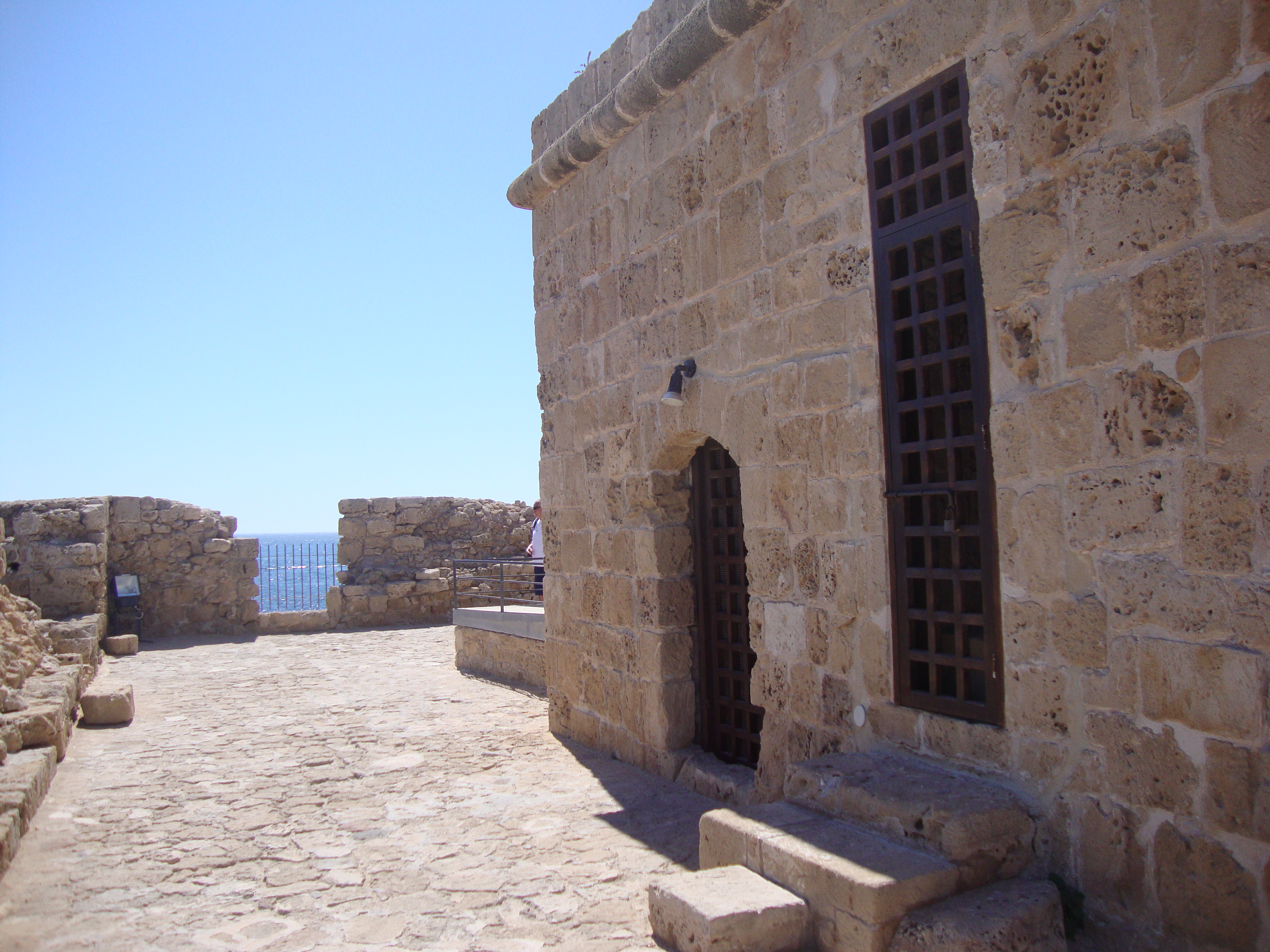 Второй этаж Пафосского замка